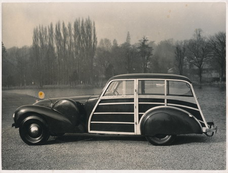 Allard Safari Wagon